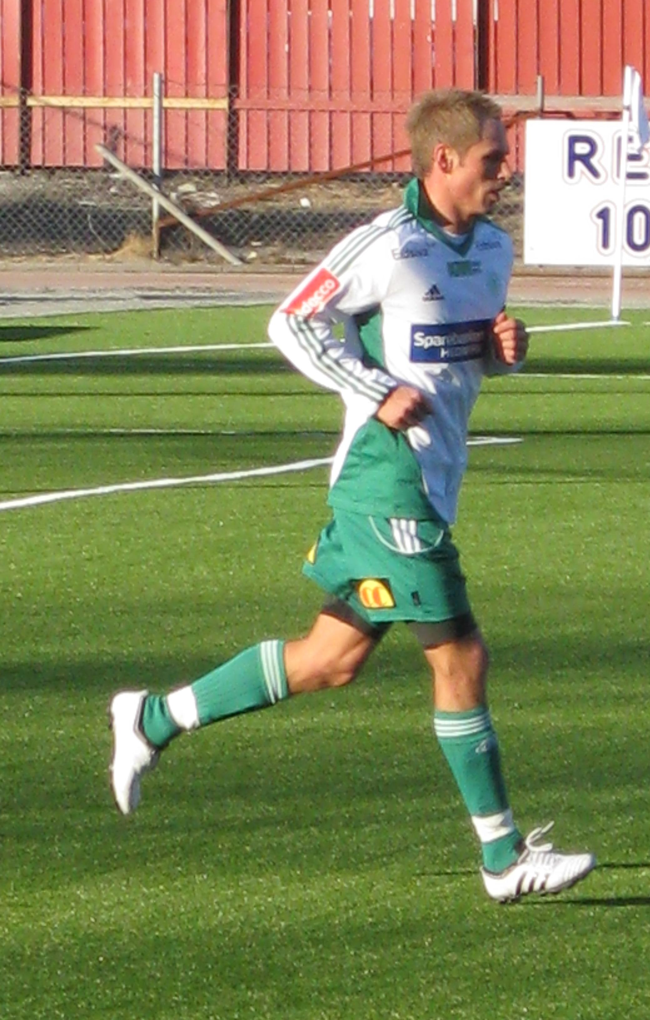 Vegar Bjerke (H-K) under en kamp mellom Kongsvinger og Hamarkameratene.